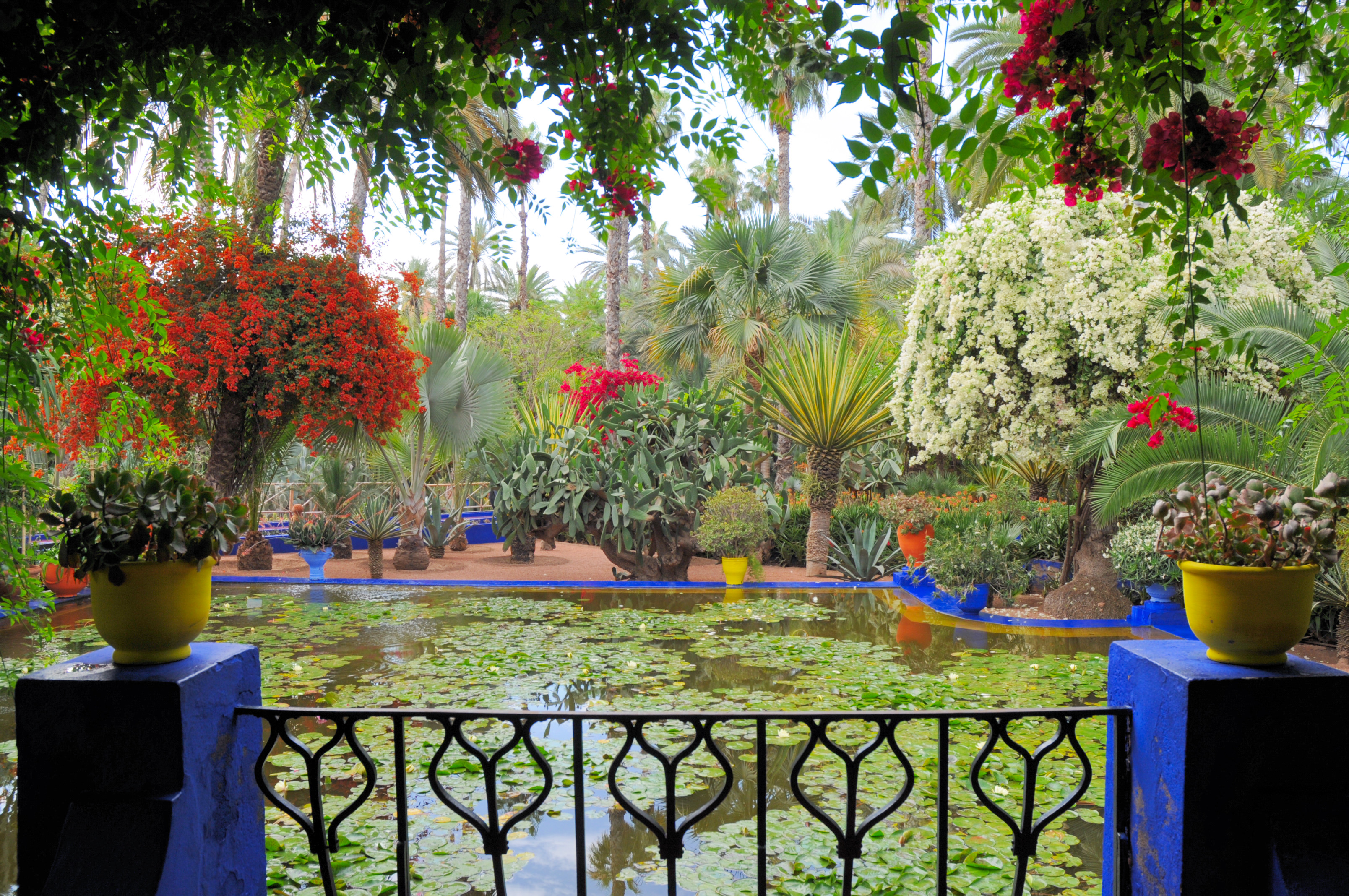 Jardin_des_majorel\Le jardin des majorelle 14.JPG marrakech maroc